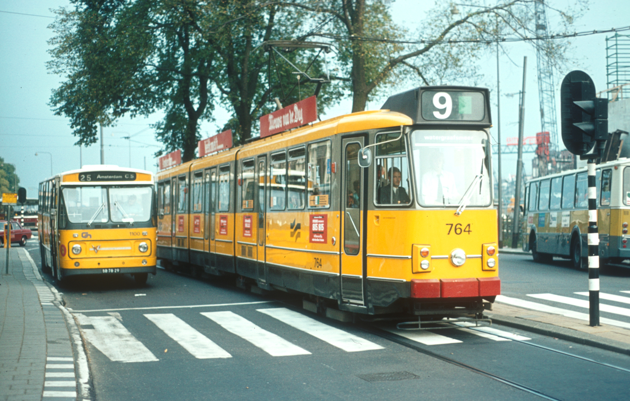 Gemeentevervoerbedrijf Amsterdam (GVB), Linke-Hofmann-Busch tram type 8G nr: 764 te Amsterdam. De Centraal Nederland (CN) bus 1100 is van het type Leyland-Verheul LVB668.